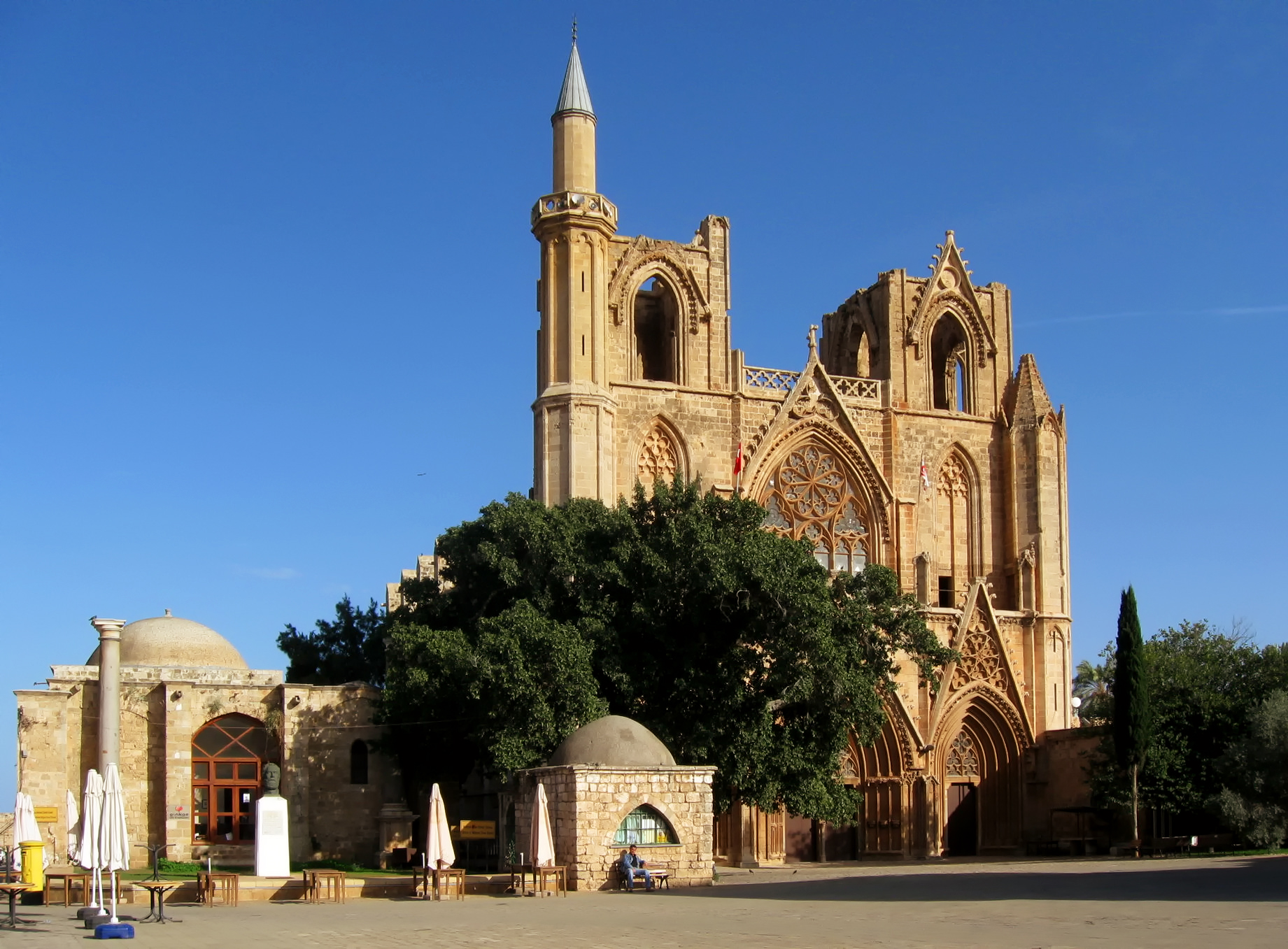 Lala-Mustafa-Pascha-Moschee, die ehemalige St. Nikolaos Kathedrale (1291-1371)